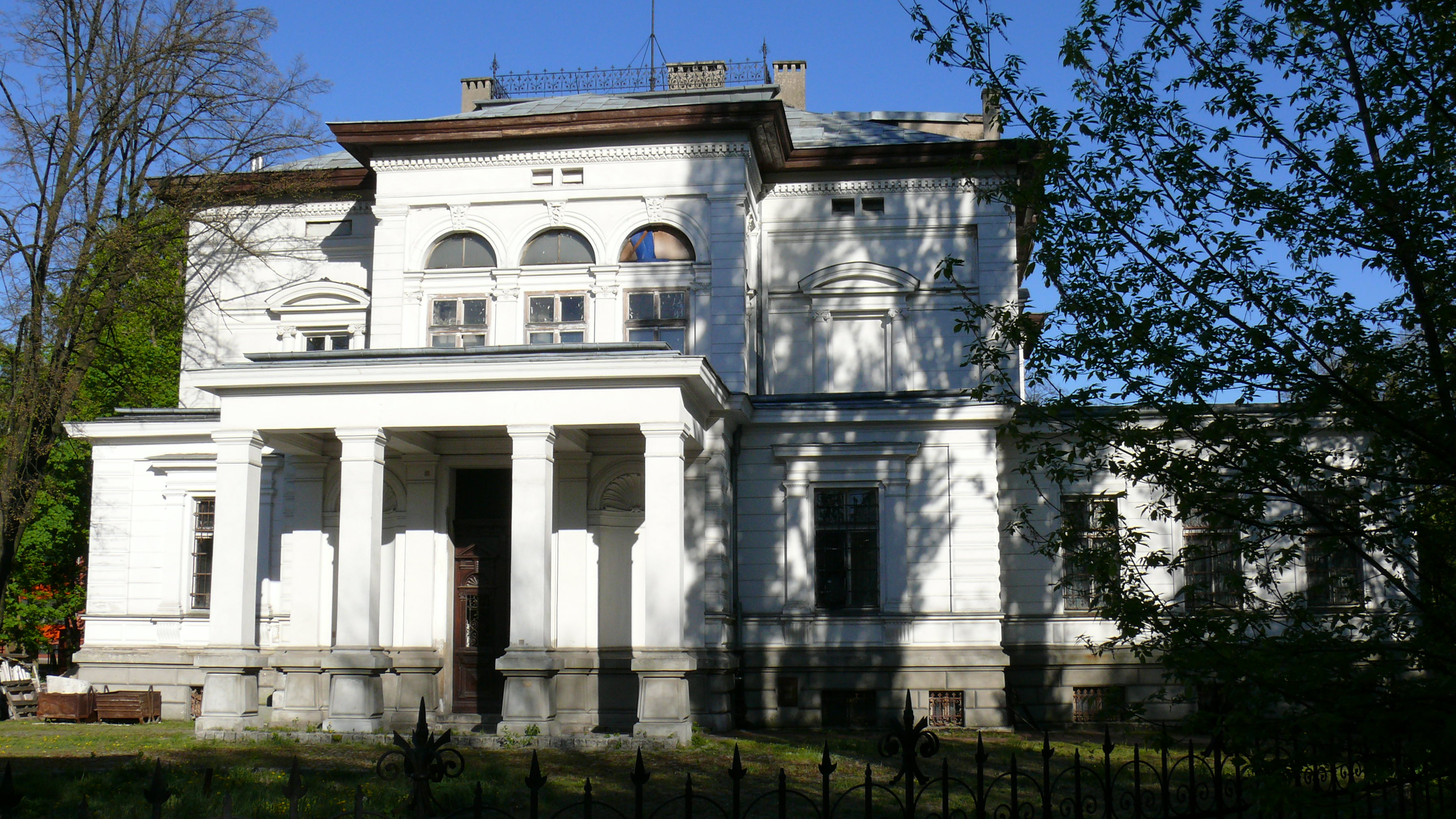 Pałac Ludwika Grohmana w Łodzi